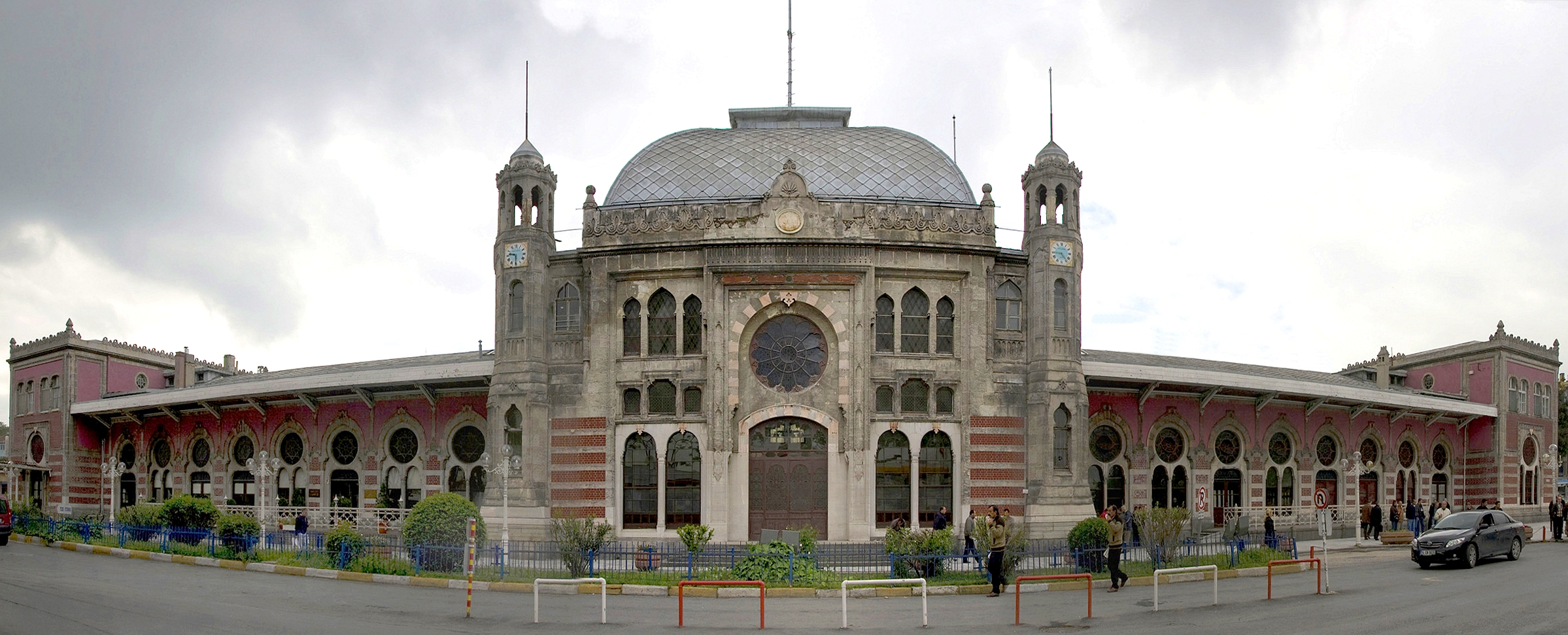 Die Frontansicht des alten Istanbuler Bahnhofs. Das Bild wurde aus drei Einzelbilder zusammengesetzt. Es stellt die alte Front des Bahnhofs dar. Hinter dem alten Gebäude befindet sich der neue Bahnhof. An diesem alten Bahnhof endete die traditionelle Strecke des Orient Express.